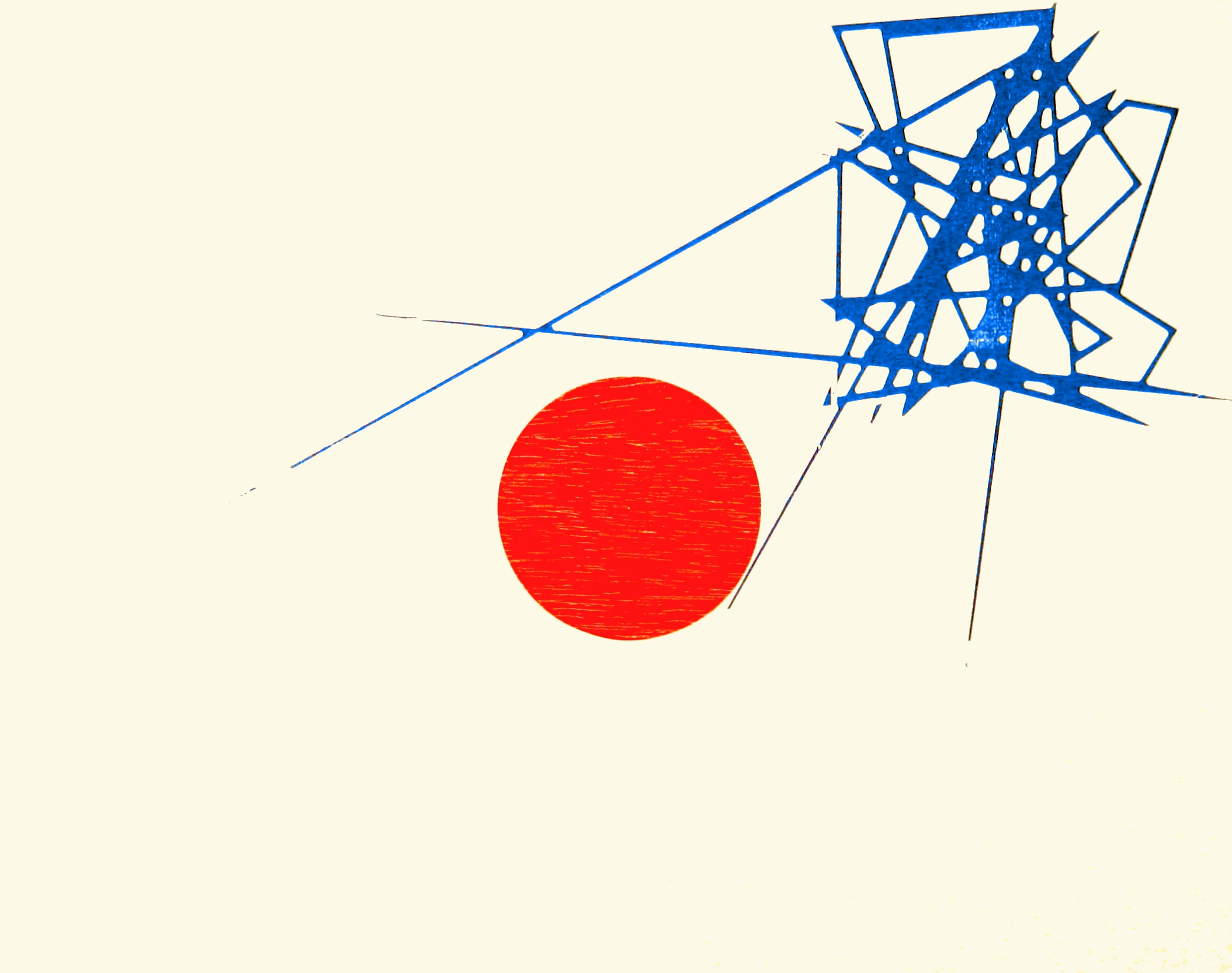 Fukushima 17, Holzschnitt von Joachim Feldmeier, 2011, Auflage 3, Papierformat 50 x 60 cm, Plattenformat 37,8 x 47,8 cm, Aquarellbütten 240 g, Drucker Feldmeier